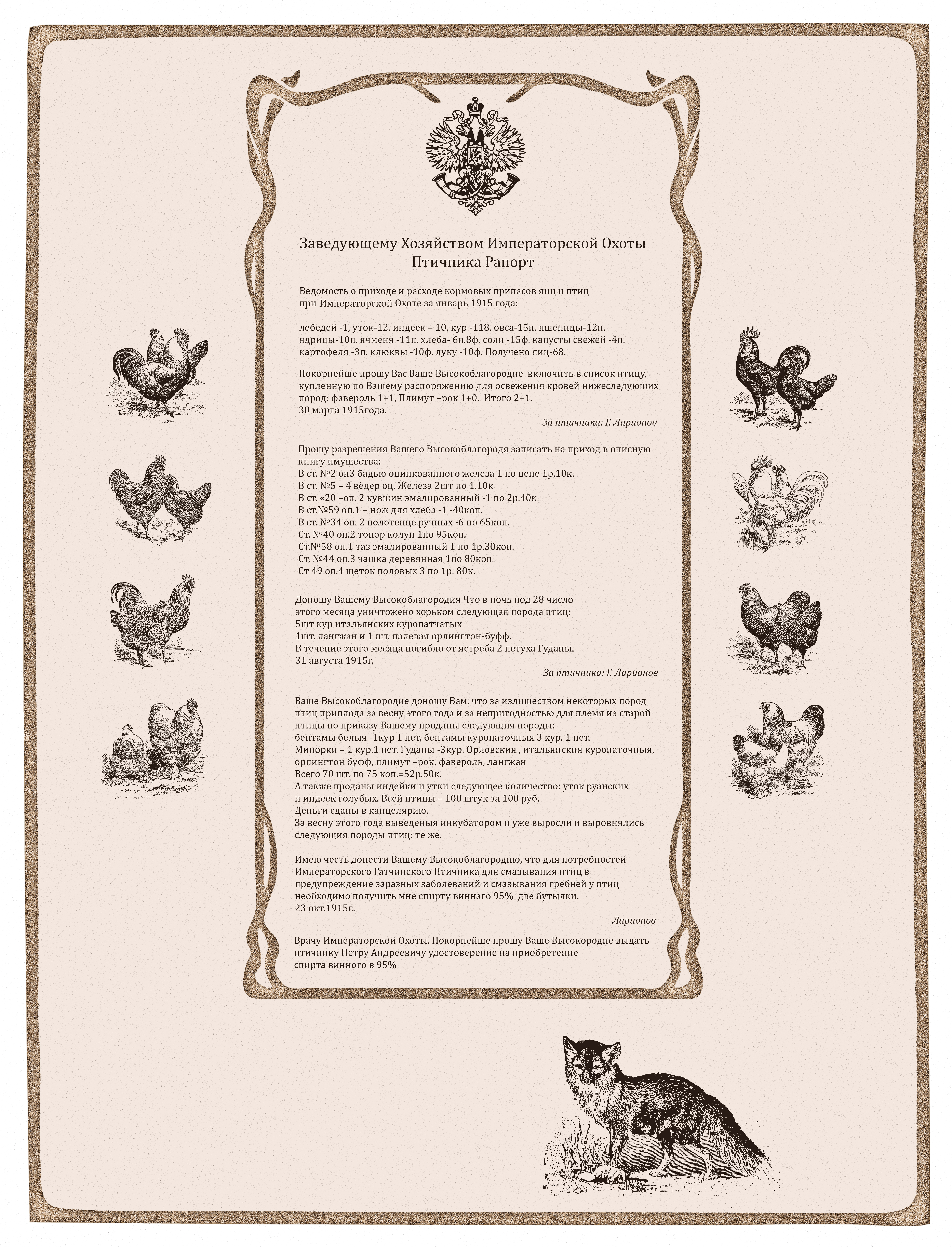 Петр Андреевич Ларионов Рапорт птичника